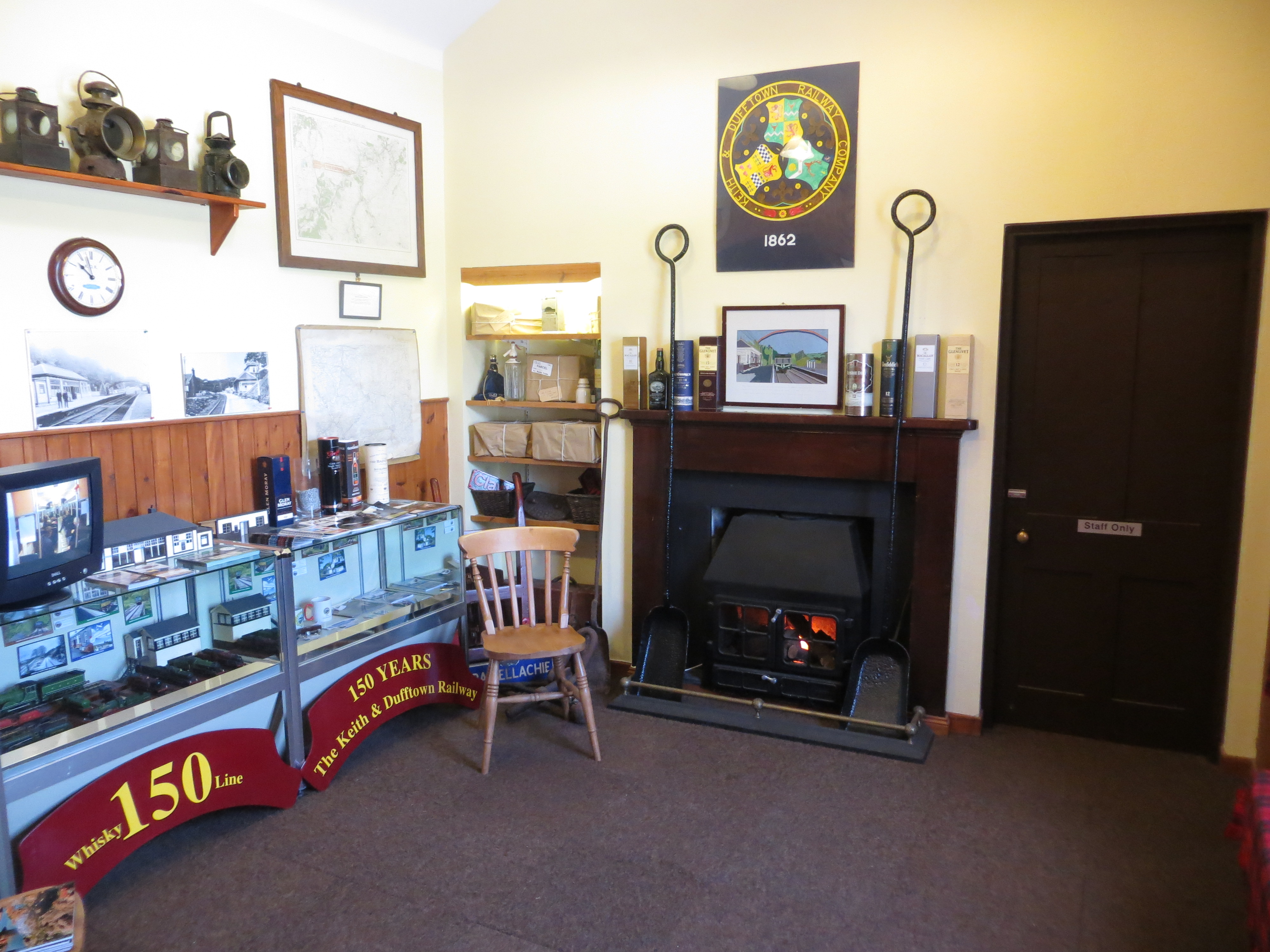 Dufftown Station, waiting R room